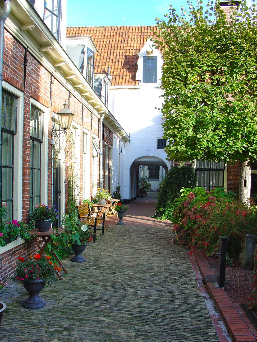 Het Peper- of Geertruitsgasthuis te Groningen